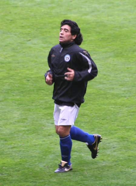 Diego Armando Maradona, en el partido de caridad Soccer Aid entre leyendas futbolísticas. El partido se disputó el 27 de mayo de 2006 entre estrellas de Inglaterra contra estrellas del Resto del Mundo.